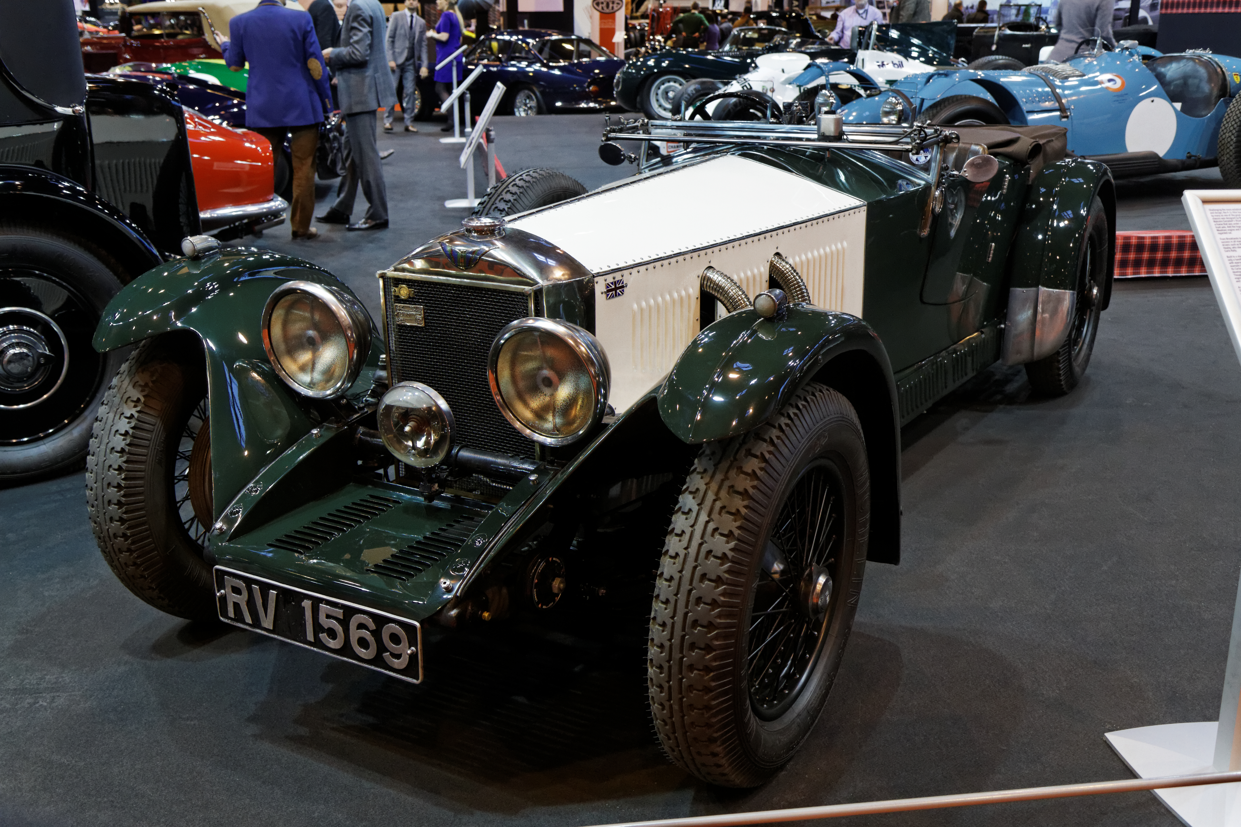 Une Invicta 4½ Litre S-Type Low Chassis exposée lors du salon Retromobile 2014.